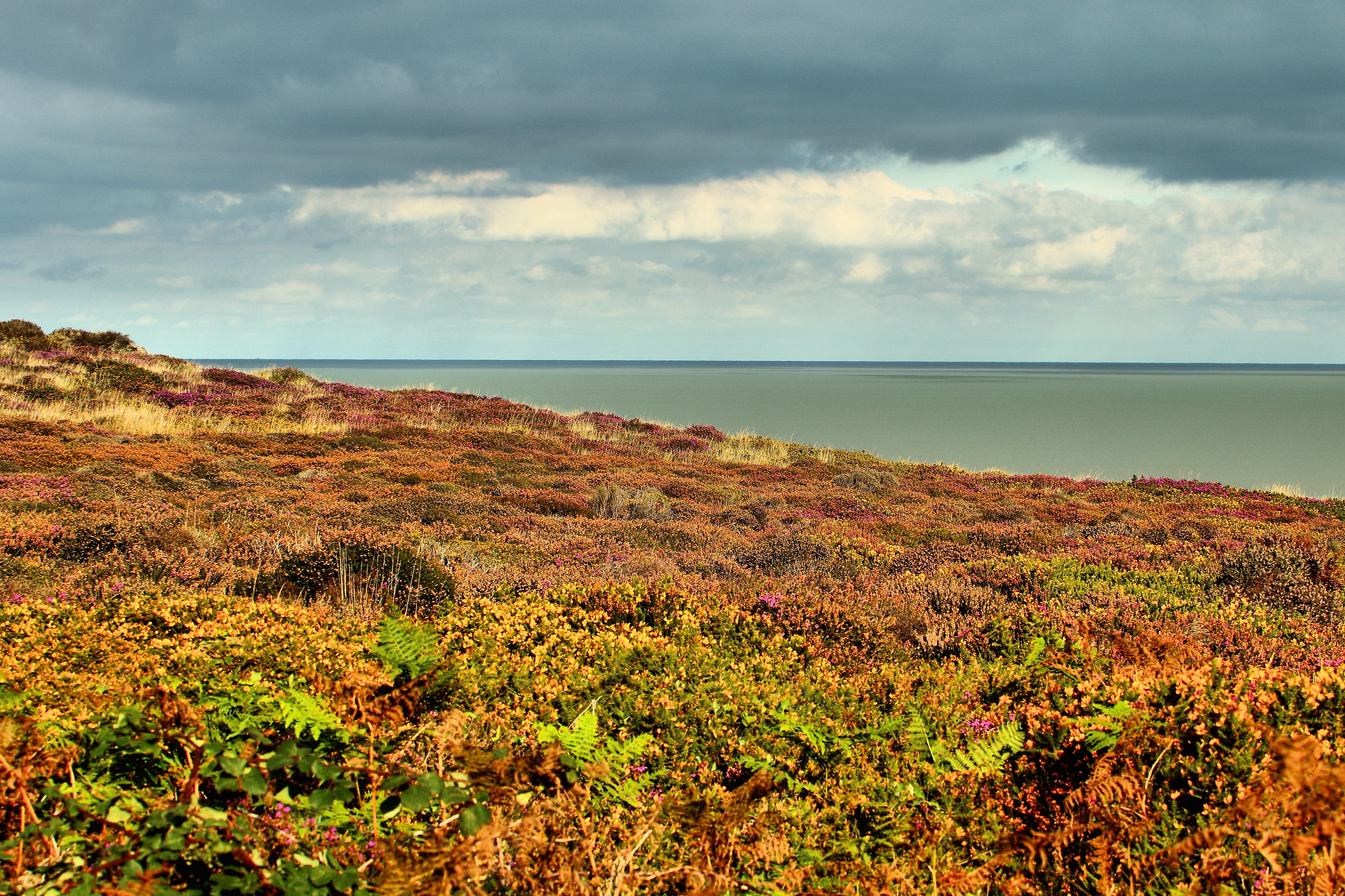 Dunwich Heath